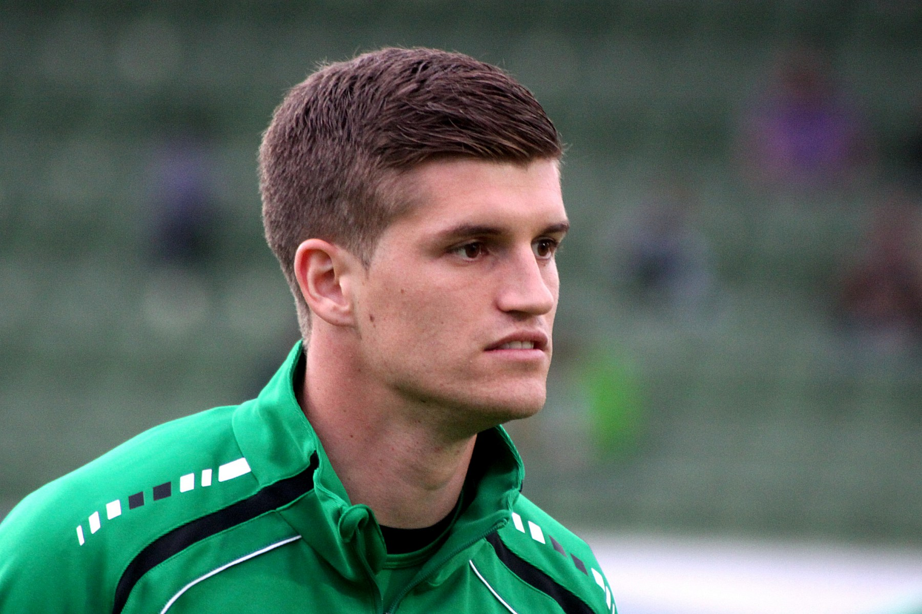 Meisterschaftsspiel der österreichischen Bundesliga: SV Mattersburg gegen FC Wacker Innsbruck am 7. April 2013 (0:0)] im Mattersburger Pappelstadion.] - Das Foto zeigt Julius Perstaller (FC Wacker Innsbruck). Object location47° 44′ 21.66″ N, 16° 24′ 23.13″ E